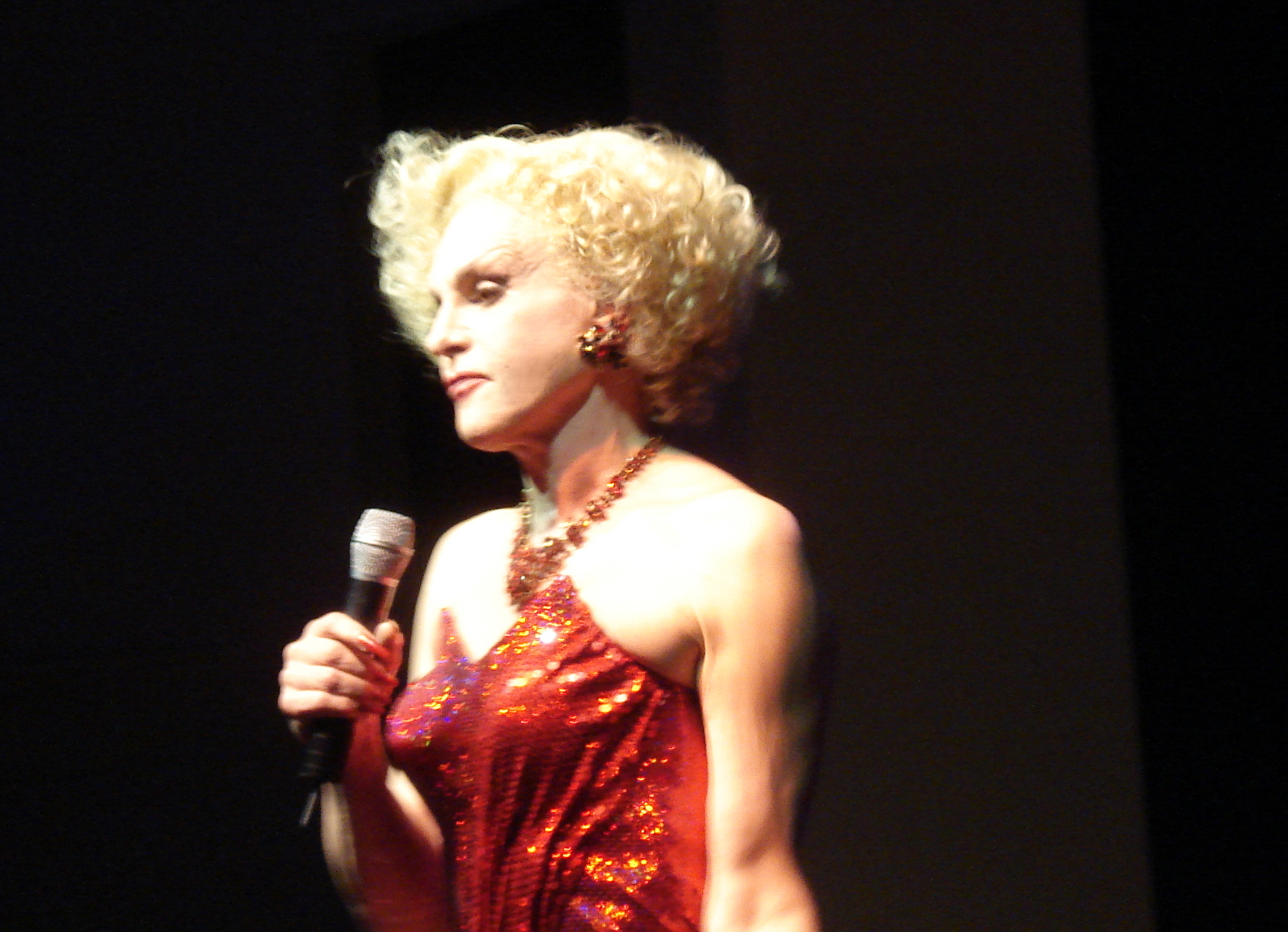 Georg Preuße in seiner Paraderolle "Mary" während der Charity-Gala "Gabi Decker and friends" im Goya am Nollendorfplatz in Berlin.